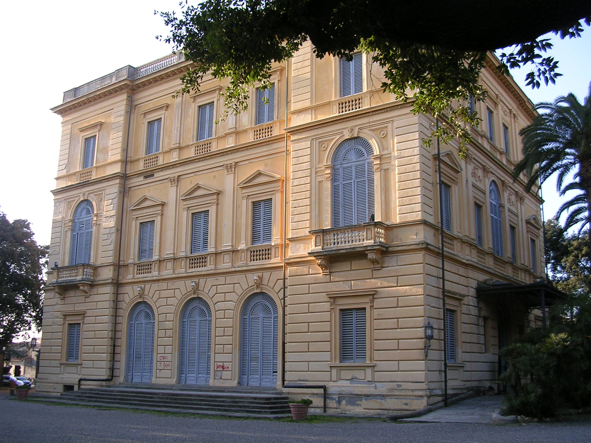 Livorno: la Villa Mimbelli, sede del Museo Civico Giovanni Fattori.